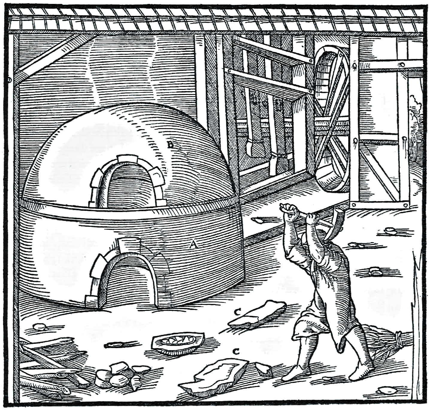 Georg Agricola, Zwölf Bücher vom Berg- und Hüttenwesen, übers. v. Carl Schiffner, Berlin 1928, S. 502 ff. Scanned by Bibliothek für Sozial- und Wirtschaftsgeschichte / Köln, rights released to the public domain. caption:"Die untere Kammer des ersten Ofens A. Die obere Kammer B. Glasstücke C."